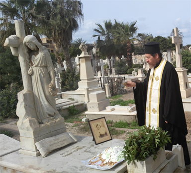 Από το Τρισάγιο στην μνήμη της Α.Παναγιωτάτου το 2017